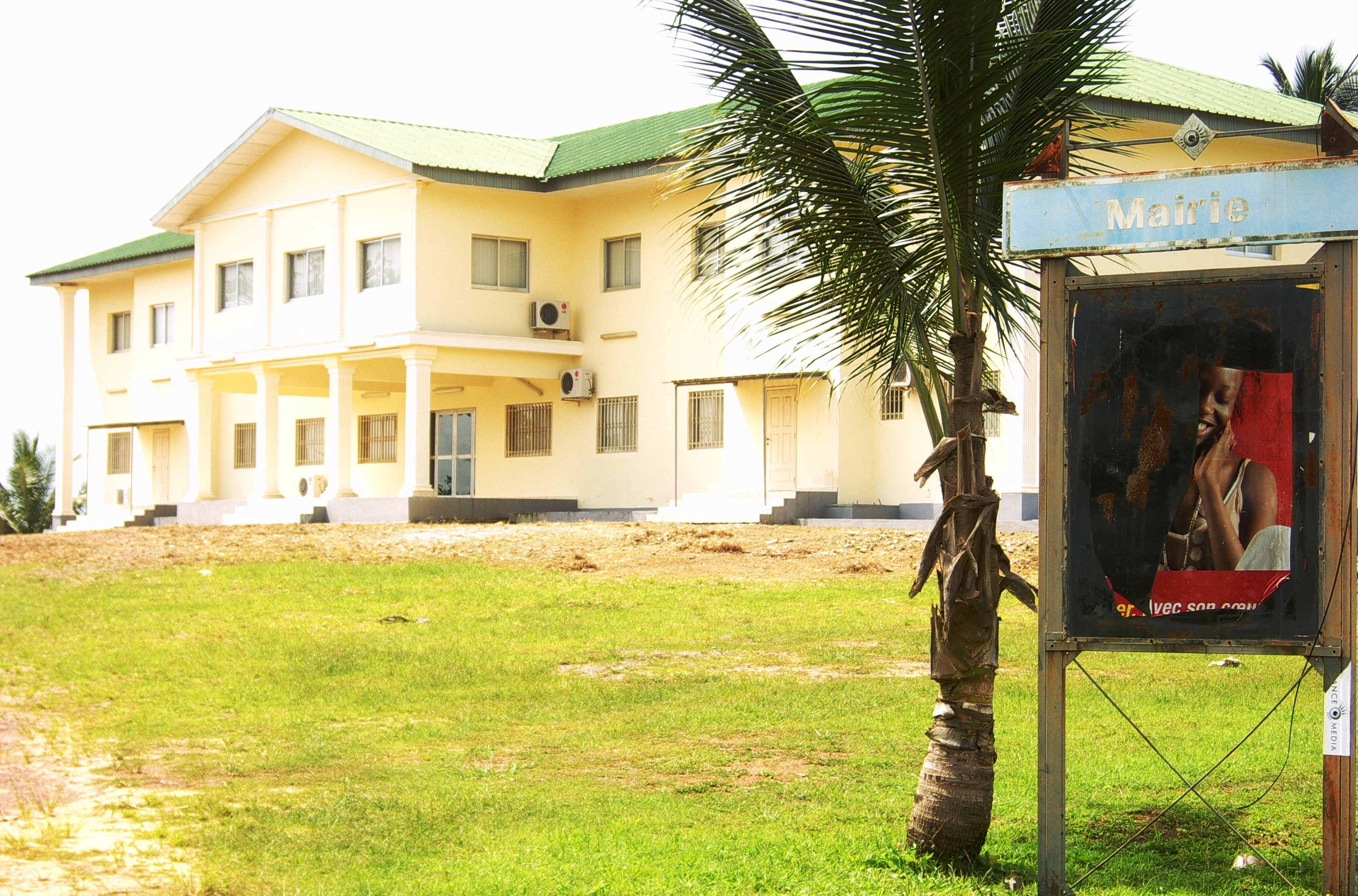 La mairie de Cocobeach au Gabon